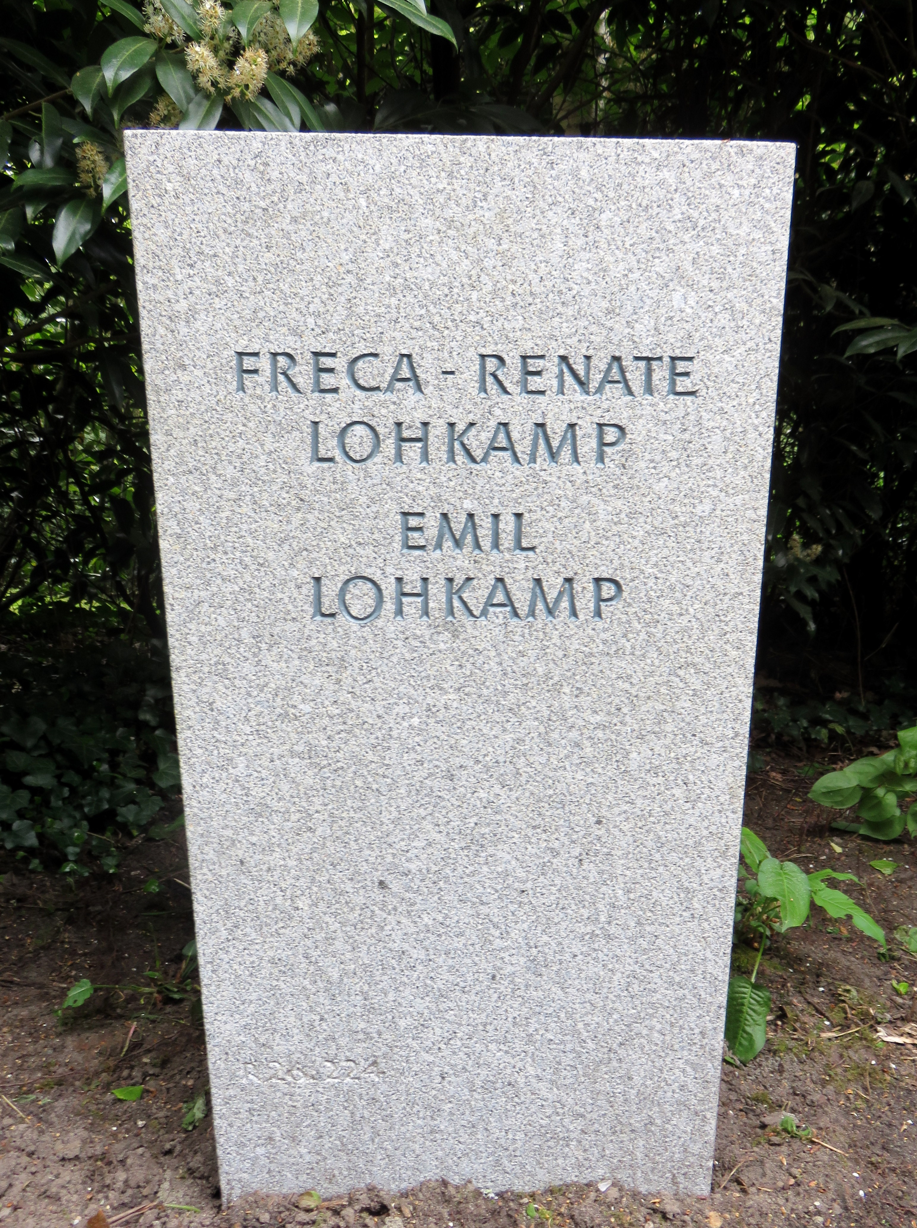 Historischer Grabstein der deutschen Schauspielerin und Theaterregisseurin Freca-Renate Bortfeldt, Ehefrau des deutschen Schauspielers und Hörfunksprechers Emil Lohkamp, im Bereich des Gartens der Frauen auf dem Ohlsdorfer Friedhof.